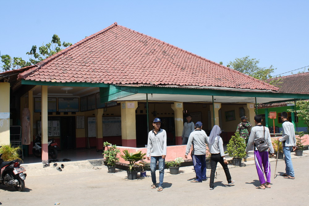 Kantor Kuwu Dukuh Widara Kecamatan Pabedilan, Kabupaten Cirebon, Provinsi Jawa Barat, Indonesia. Date 13 September 2014.